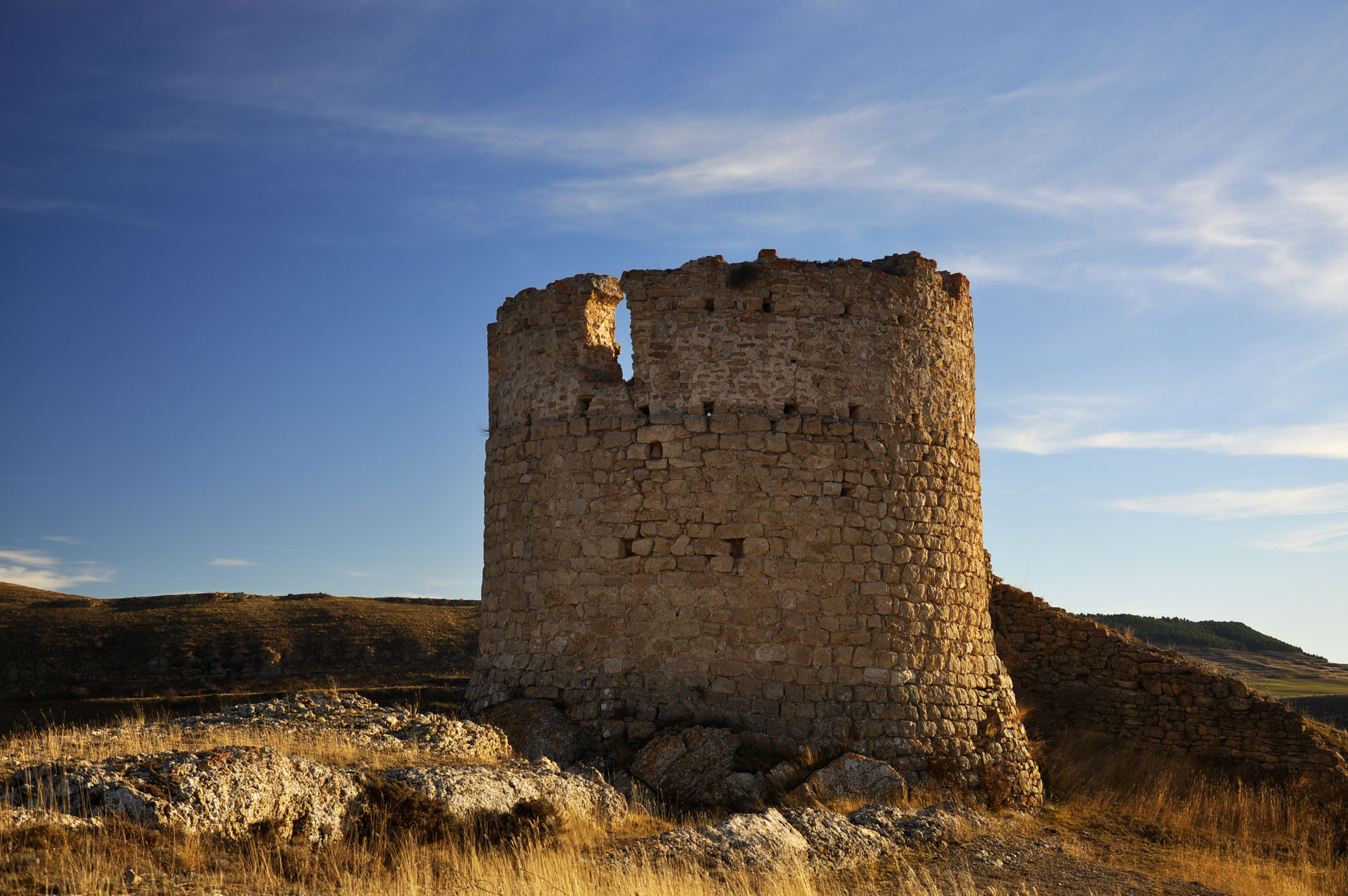 El castillo-refugio fue construido durante la guerra de los Dos Pedros en el siglo XIV pero posteriormente abandonado, aunque se volvió a usar durante las guerras carlistas en el siglo XIX. Los restos del castillo se encuentran sobre una loma de escasa aunque suficiente elevación, al lado de las ruinas de la antigua iglesia. Estos abarcan bastante superficie, consistiendo en una muralla baja de piedras menudas reforzada por tres cubos semicirculares y en la cota más alta una torre de mampostería y planta circular de unos 7 metros de diámetro y rebajada en altura. Al pie del monte se conservan los restos del fortín carlista, dos muros con aspilleras para fusiles. El castillo-refugio fue construido durante la guerra de los Dos Pedros en el siglo XIV pero posteriormente abandonado, aunque se volvió a usar durante las guerras carlistas en el siglo XIX. Los restos del castillo se encuentran sobre una loma de escasa aunque suficiente elevación, al lado de las ruinas de la antigua iglesia. Estos abarcan bastante superficie, consistiendo en una muralla baja de piedras menudas reforzada por tres cubos semicirculares y en la cota más alta una torre de mampostería y planta circular de unos 7 metros de diámetro y rebajada en altura. Al pie del monte se conservan los restos del fortín carlista, dos muros con aspilleras para fusiles.